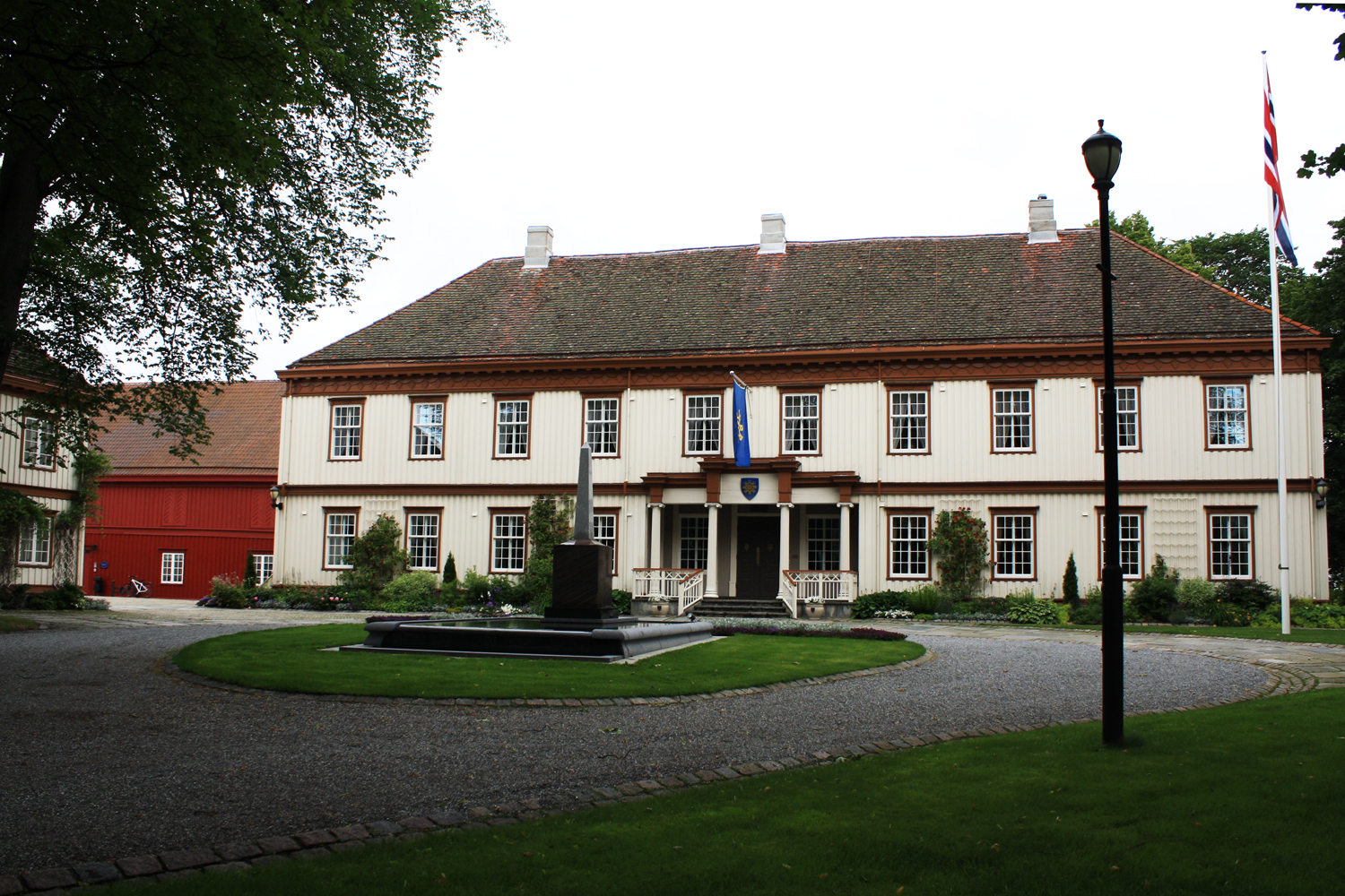 Hovedbygningen på Lade gård, Trondheim, 2013